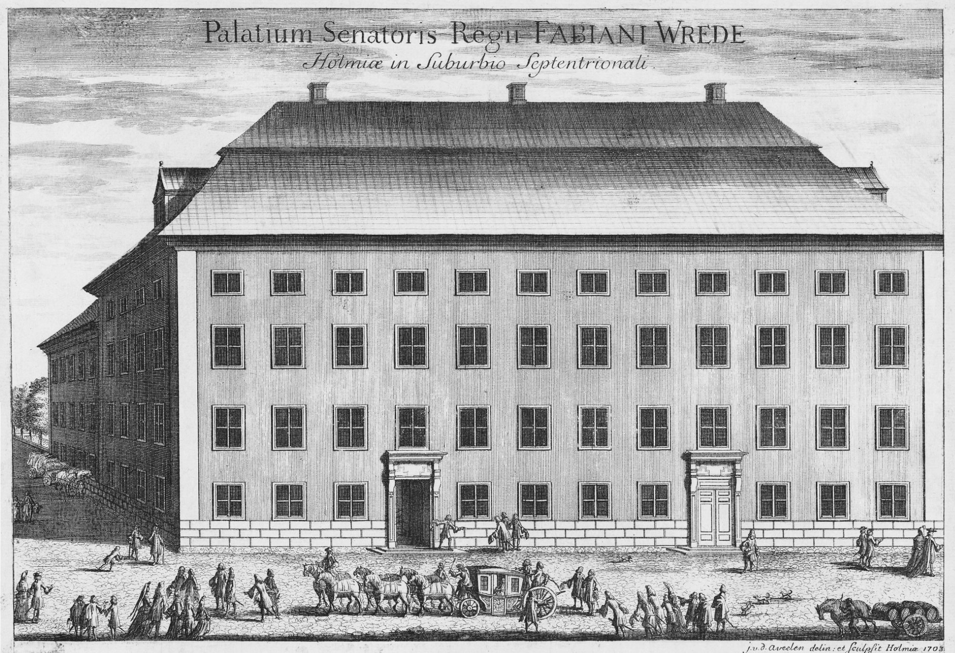 Kungliga rådet Fabian Wredes palats på Norrmalm i Stockholm